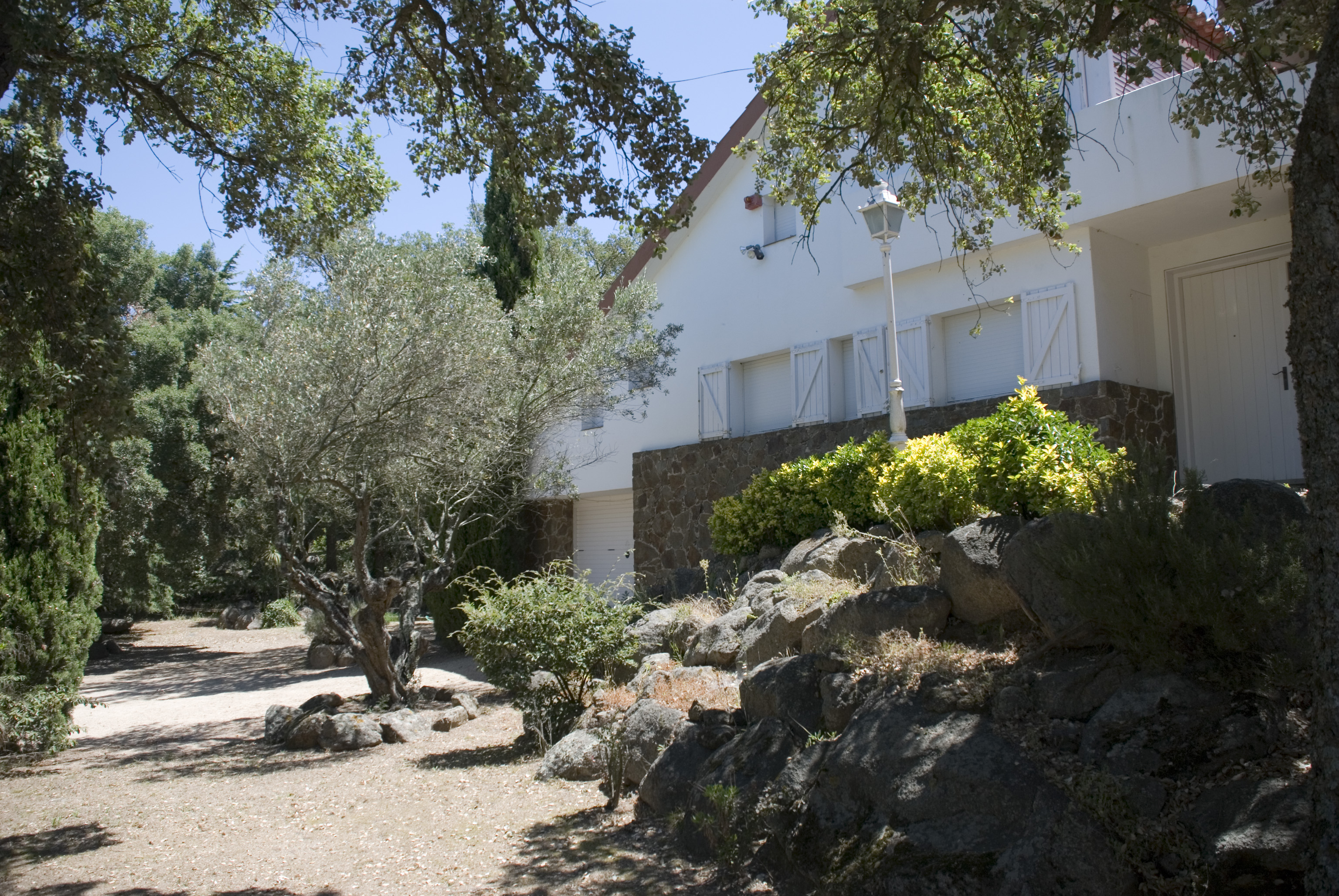 Fotografia del xalet El Senyal Vell de Mercè Rodoreda a Romanyà de la Selva, CT. Camera data Camera Nikon D80 Lens Nikon AF-S DX 18-135 mm Focal length 20 mm Aperture f/3.5 Exposure time 400 s Sensivity ISO 100